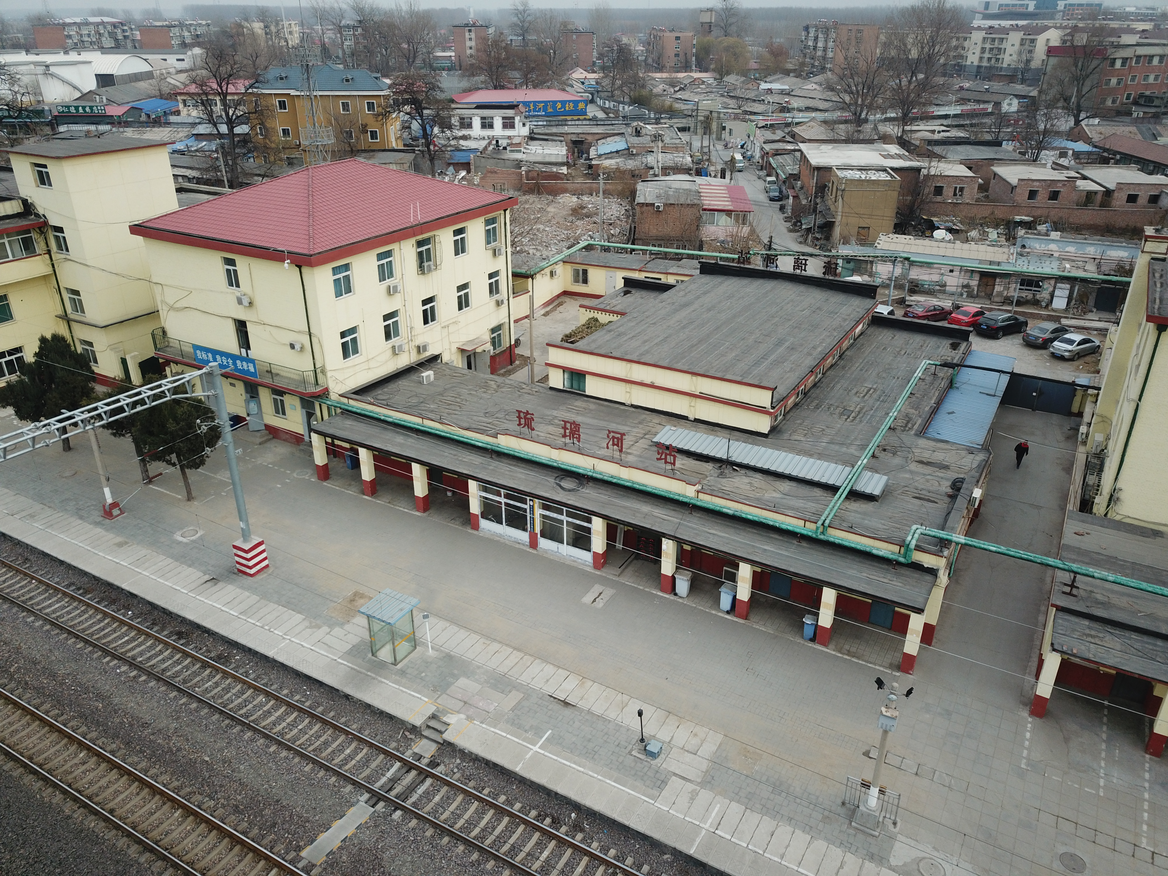 中文（中国大陆）: 琉璃河火车站站台航拍